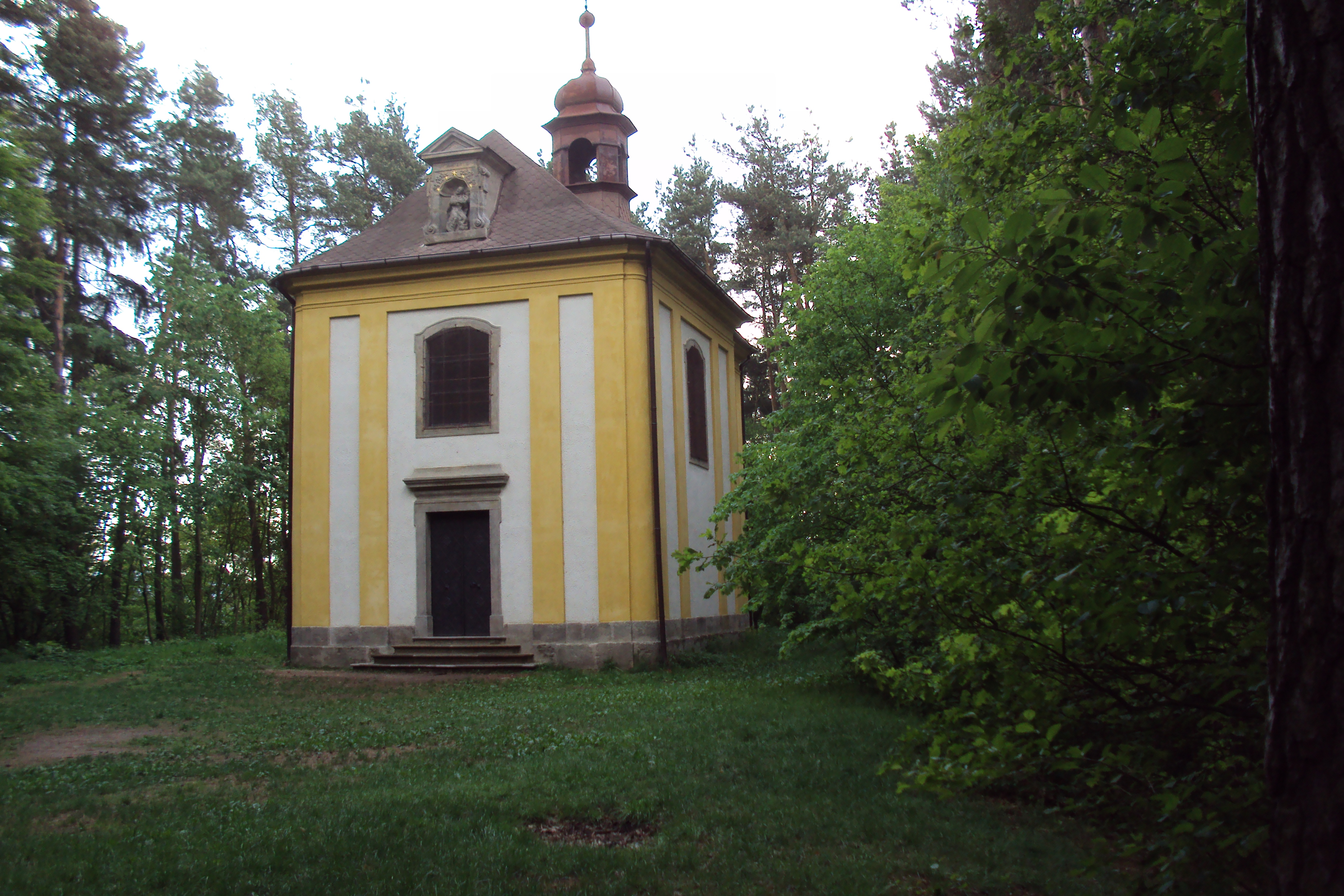 Kaple nad Stráží pod Ralskem u zámku